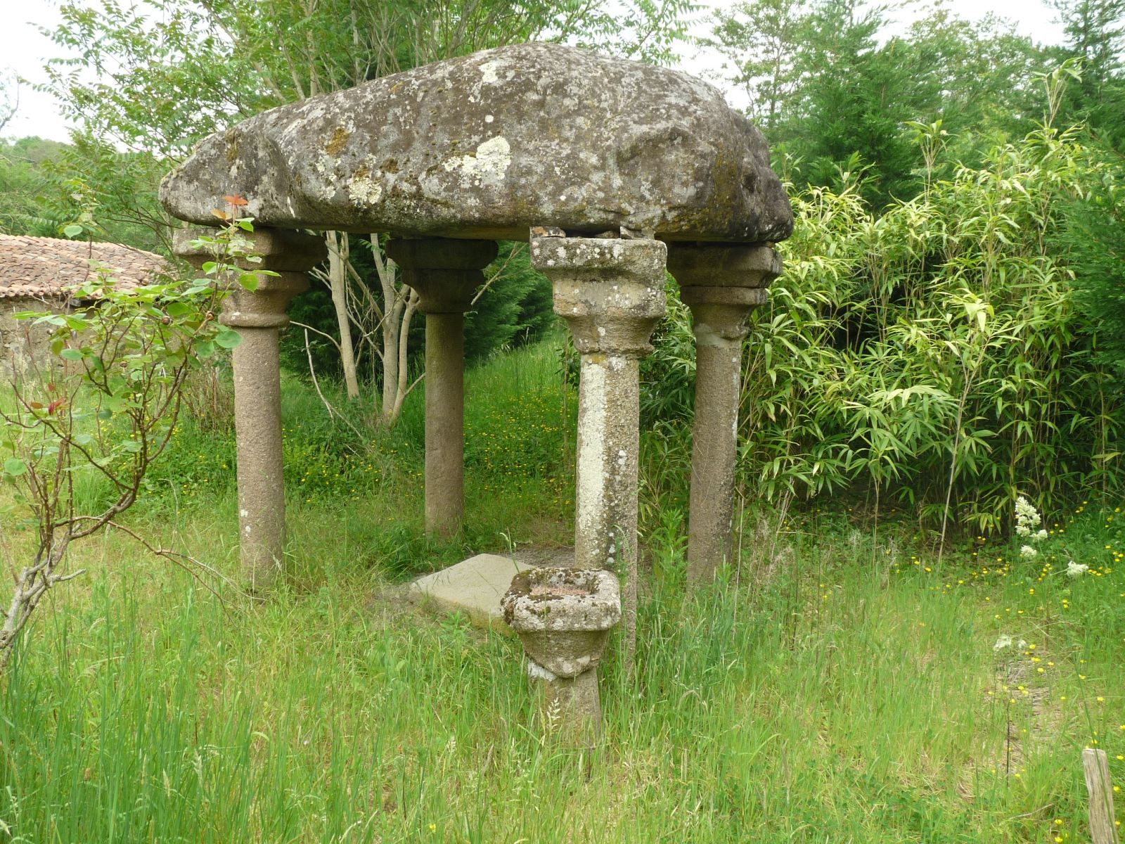 dolmen de Sainte-Madeleine, Lessac, Charente, France